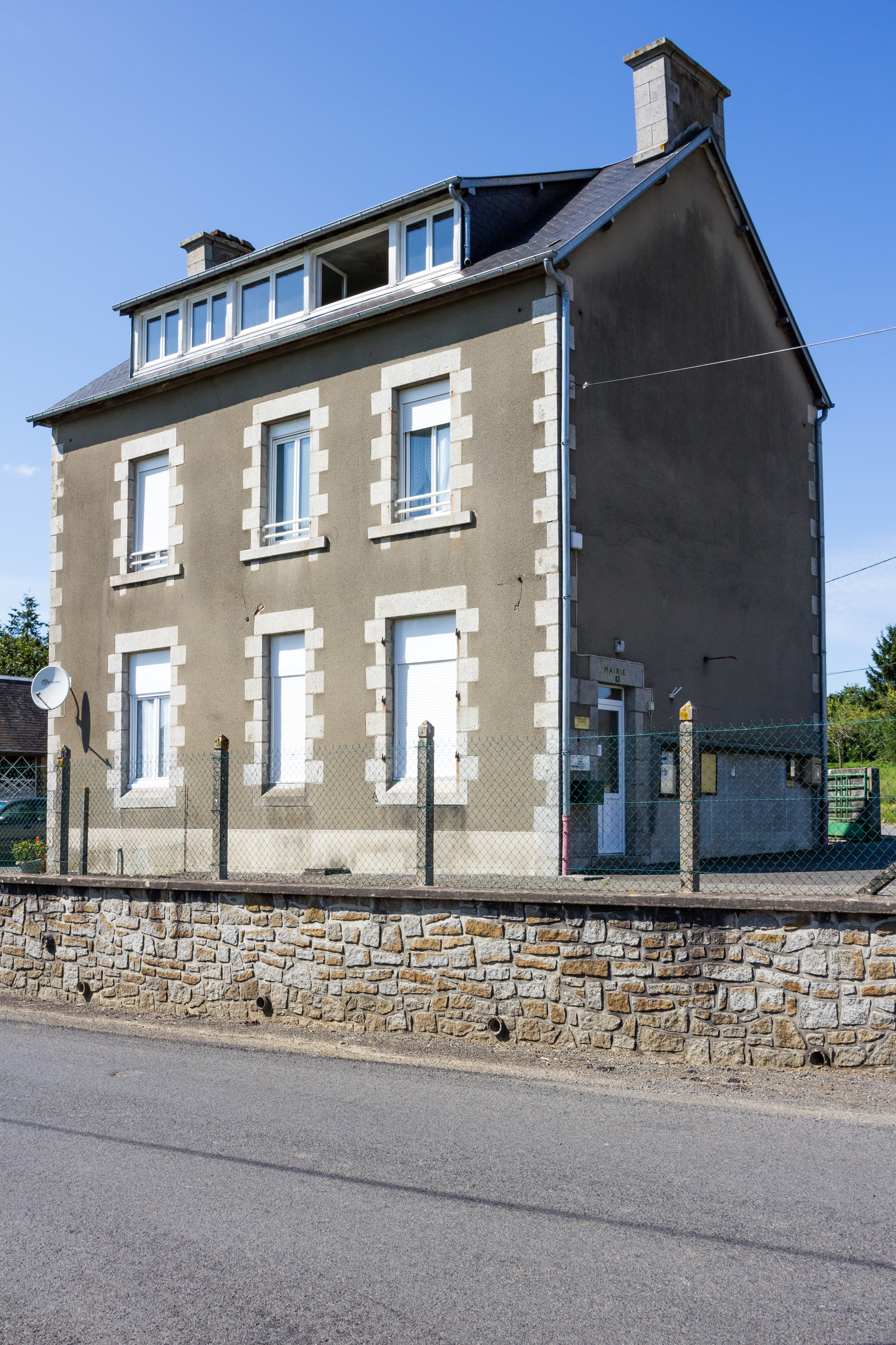 Mairie de Chasseguey (France).